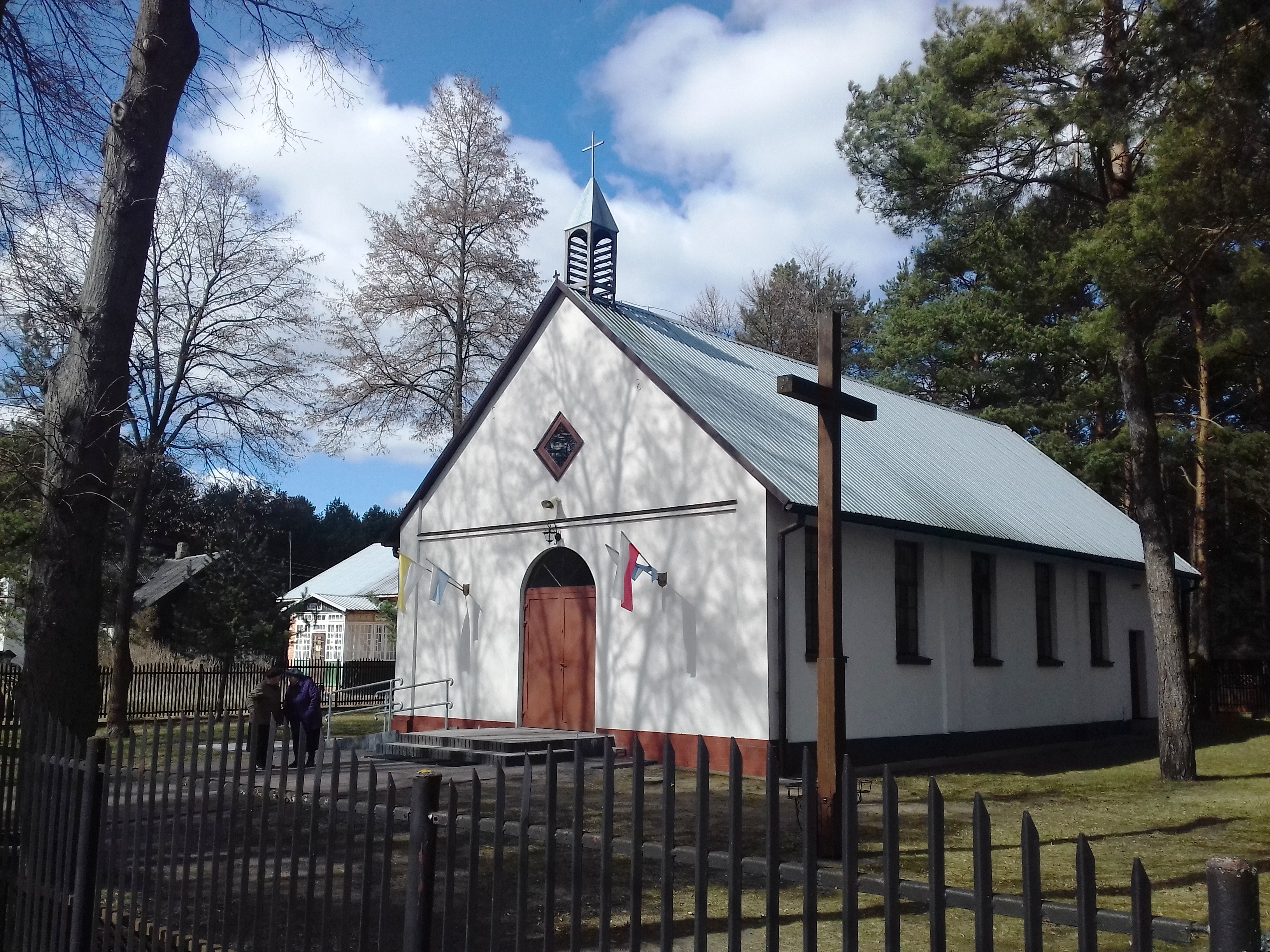 Szewnica (gm. Jadów, pow. Wołomin) - kościół Przemienienia Pańskiego